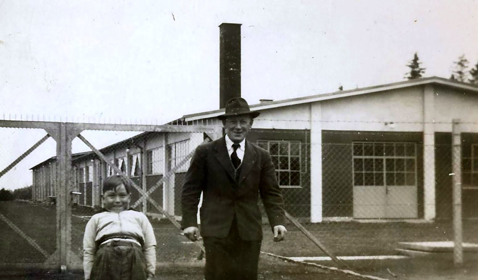 Militærdepotet 'Hammer Depot' Påskedag 1955, kort tid efter etableringen. På billedet ses den daglige leder materielforvalter Jens Christian Pedersen og hans søn Birger.